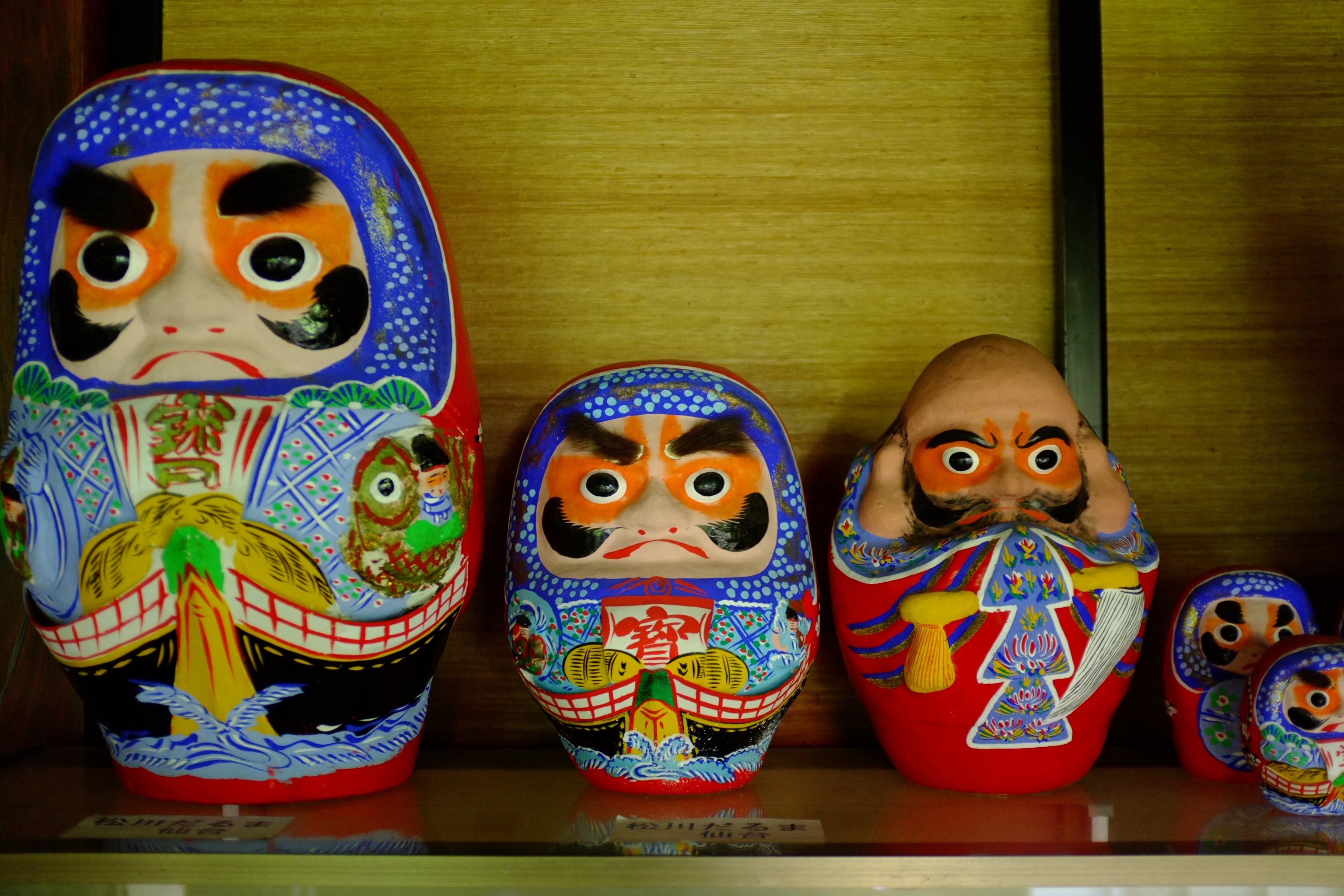 蟹仙洞で展示されている仙台の民芸品「松川だるま」。